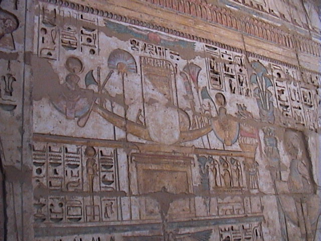 La barque sacrée du dieu Khonsou. Relief peint du temple funéraire de Ramsès III à Médinet Habou - XXe dynastie égyptienne